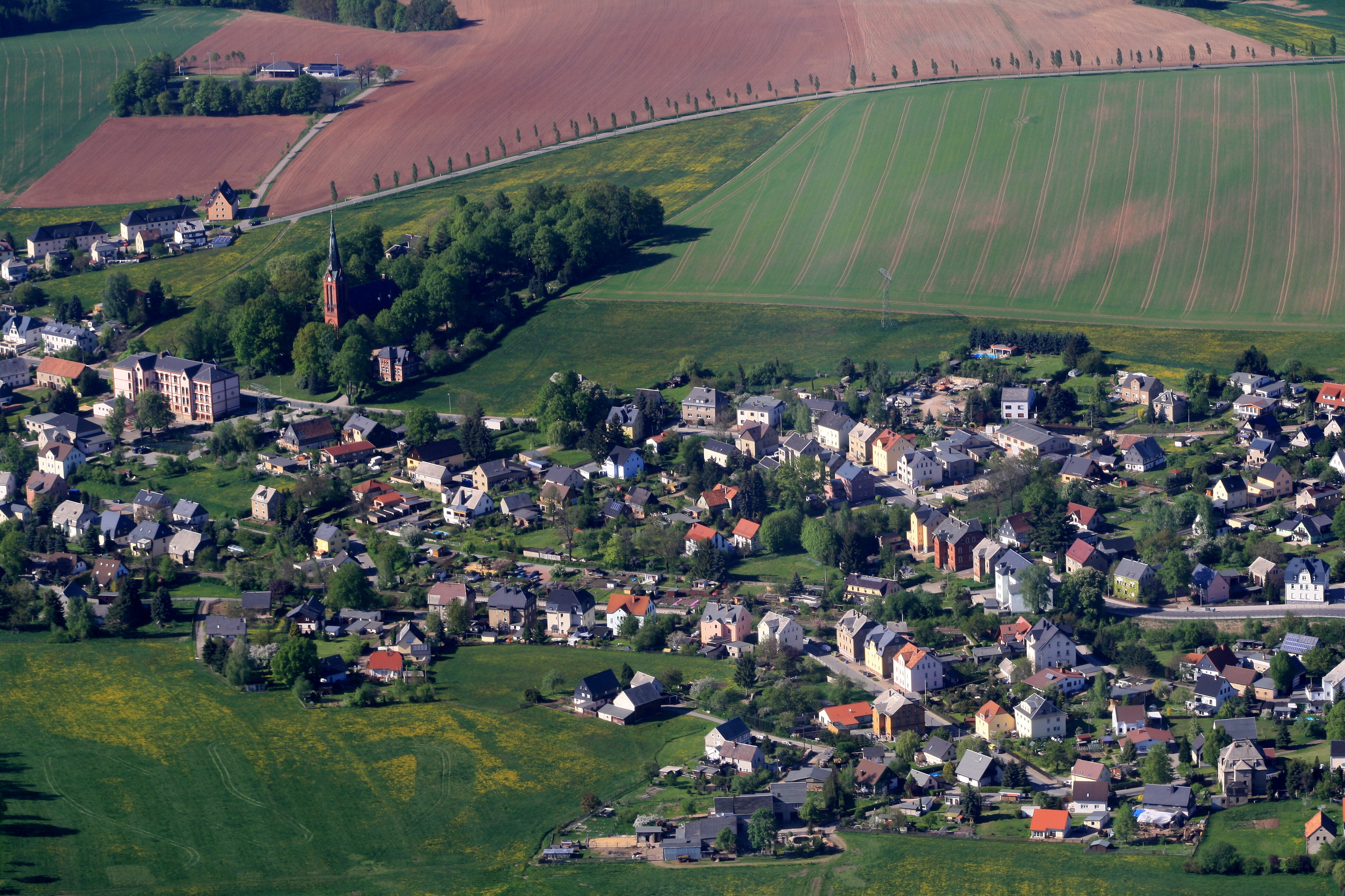 09394 Hohndorf, Erzgebirgskreis.